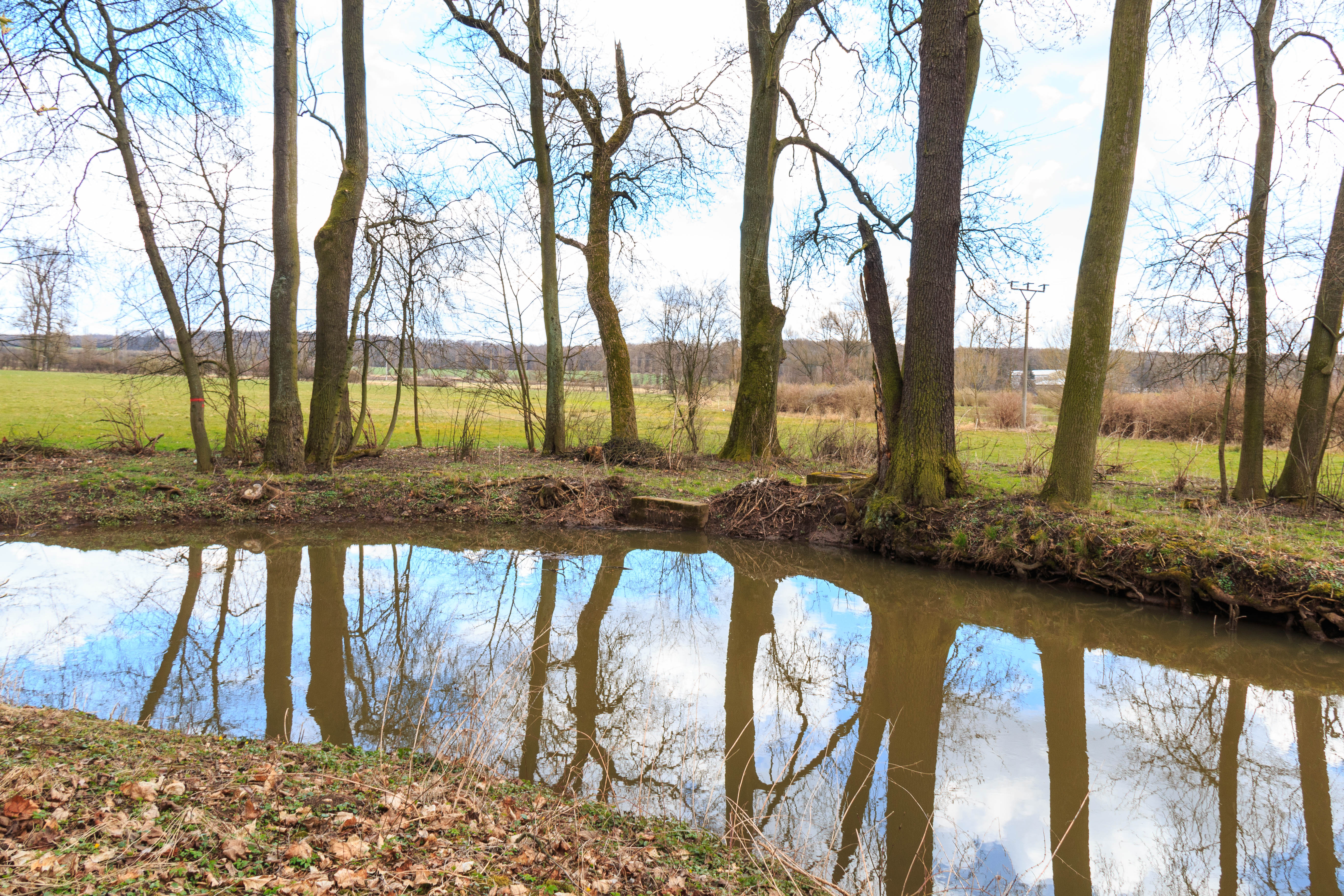 Skřivany náhon k elektrárně